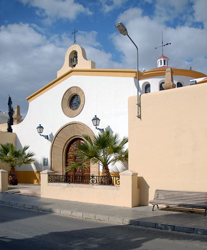 Iglesia construída en 1945, situada en el barrio de Regiones Devastadas de Almería.